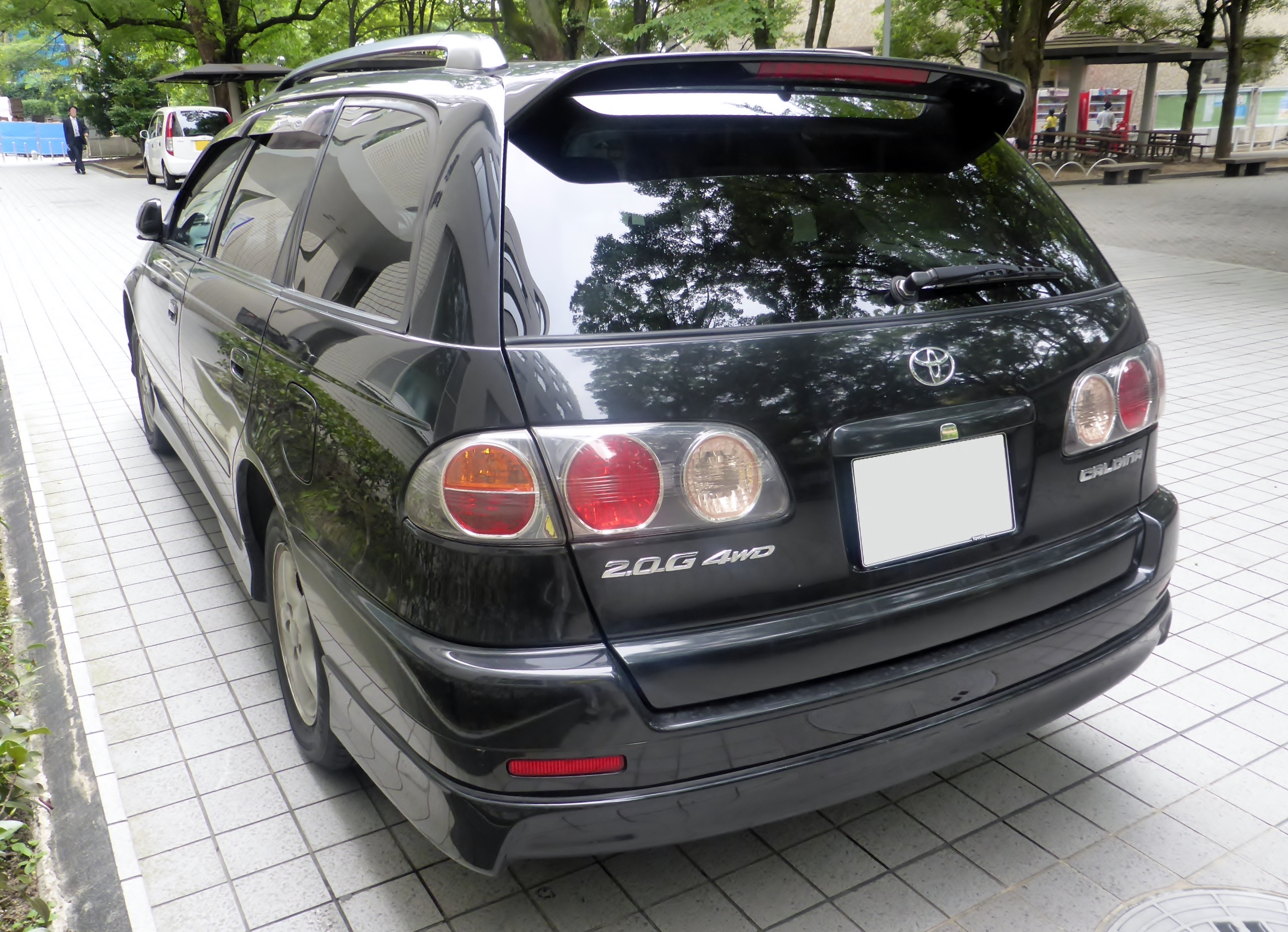 ST215G型トヨタ・カルディナ2.0G 4WDをリアから撮影。